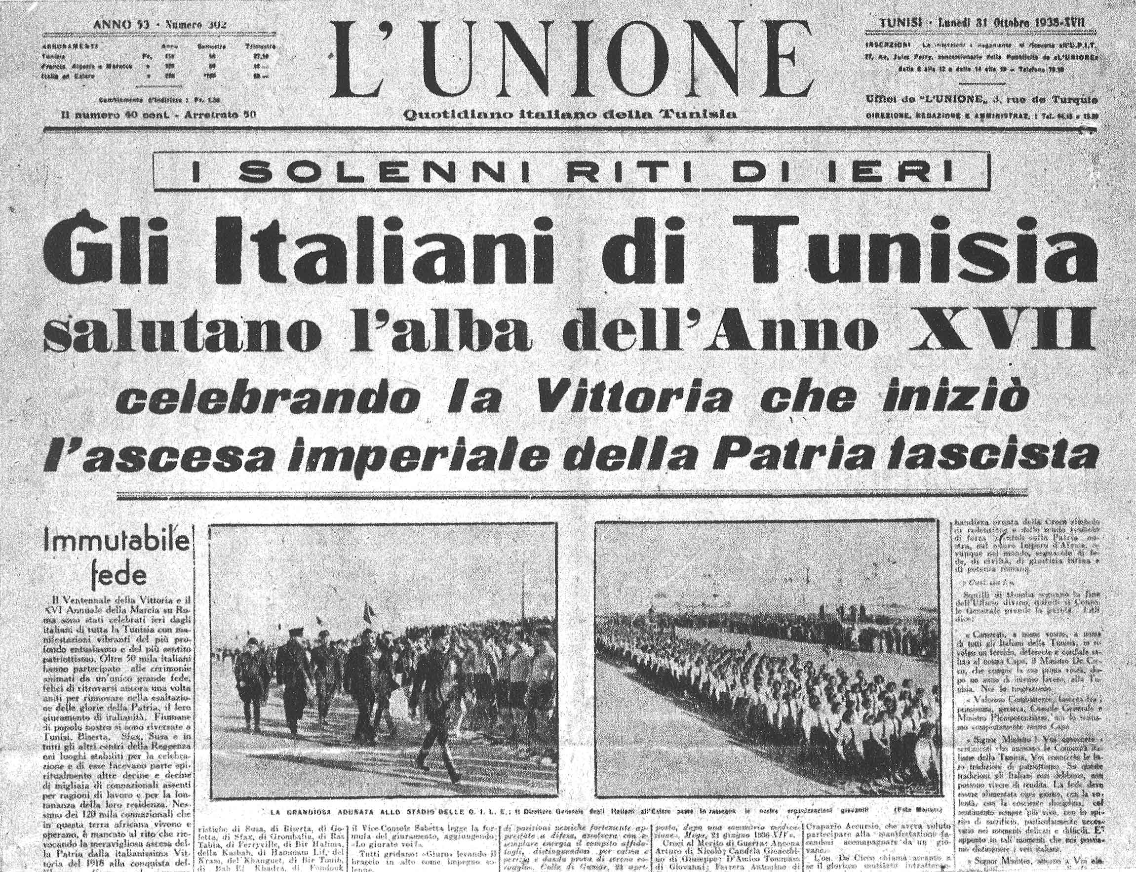 Journal italien de Tunisie, octobre 1938